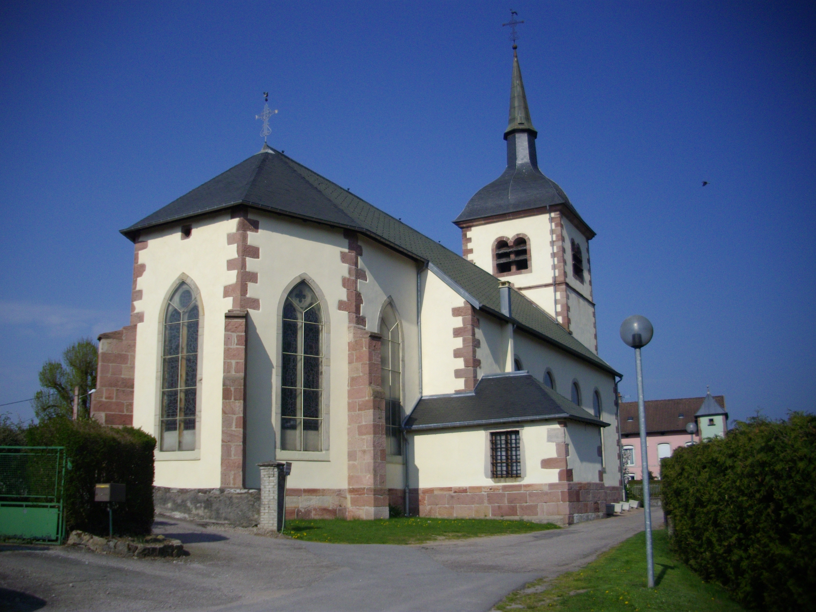 Au village, l’église de l’invention de Saint-Étienne (XVIIIe s), consacrée en 1759, et son orgue de 1872 des frères Géhin.